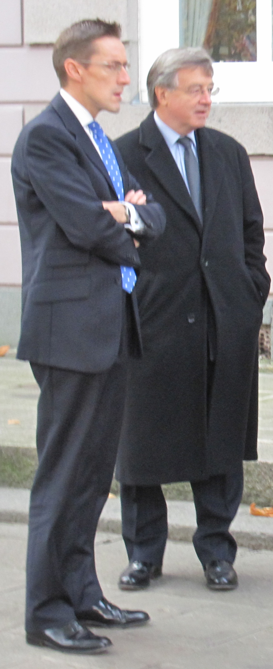 Nrf: Dans l'Vièr Marchi, Saint Hélyi, Jèrri: lé 14 dé Novembre, juste dévant l'assèrmentâtion des Membres d's Êtats dans la Cour Rouoyale.